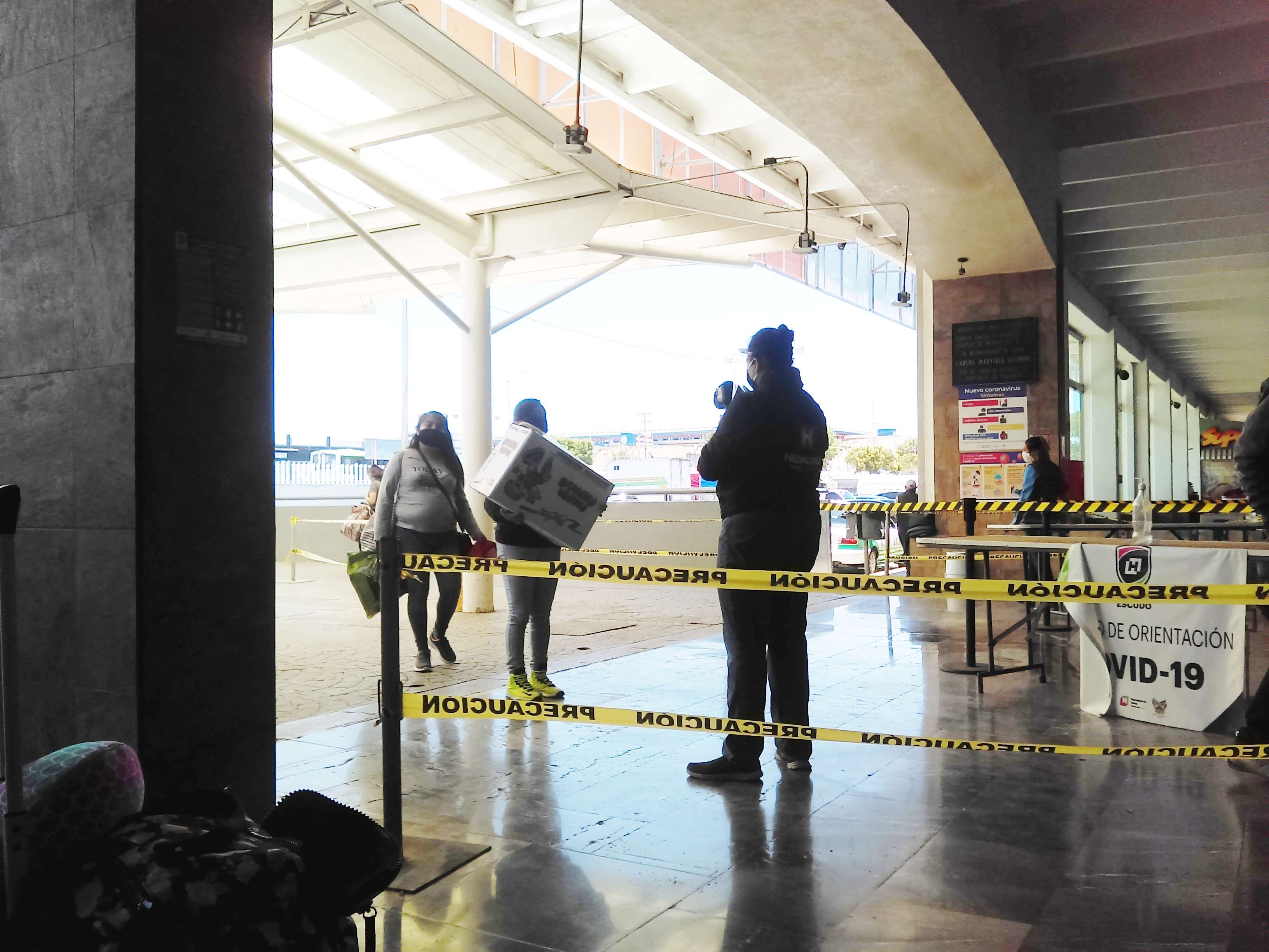 Central de Autobuses de Pachuca durante la pandemia de COVID-19. 01